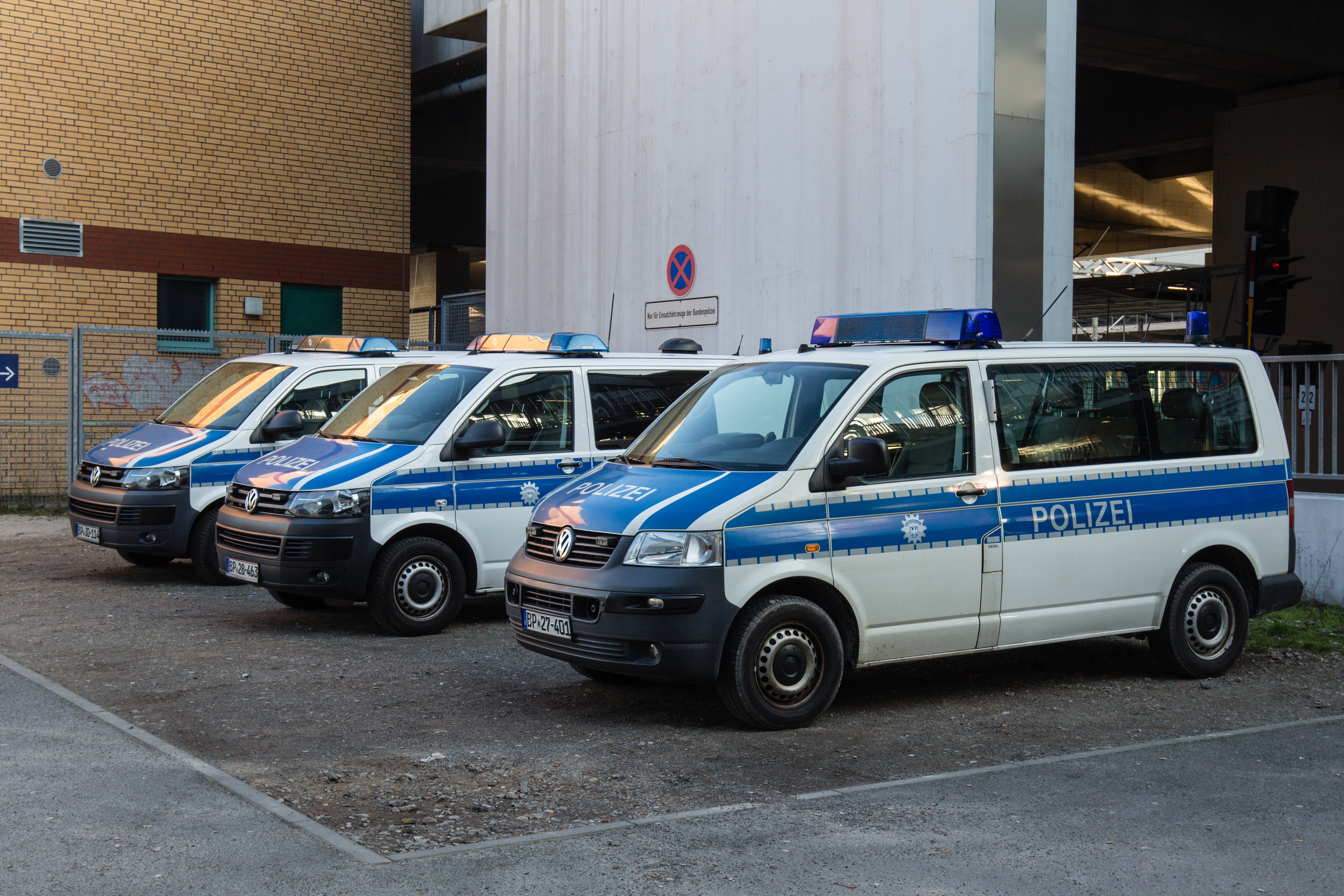 Fahrzeuge der Bundespolizei am Bahnhof Südkreuz in Berlin-Schöneberg.